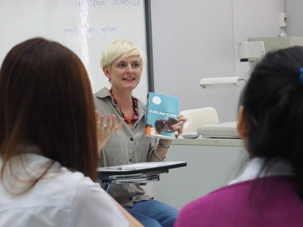 Kathrin Schrocke - Vorlesung an der Chulalongkorn Universität in Bangkok